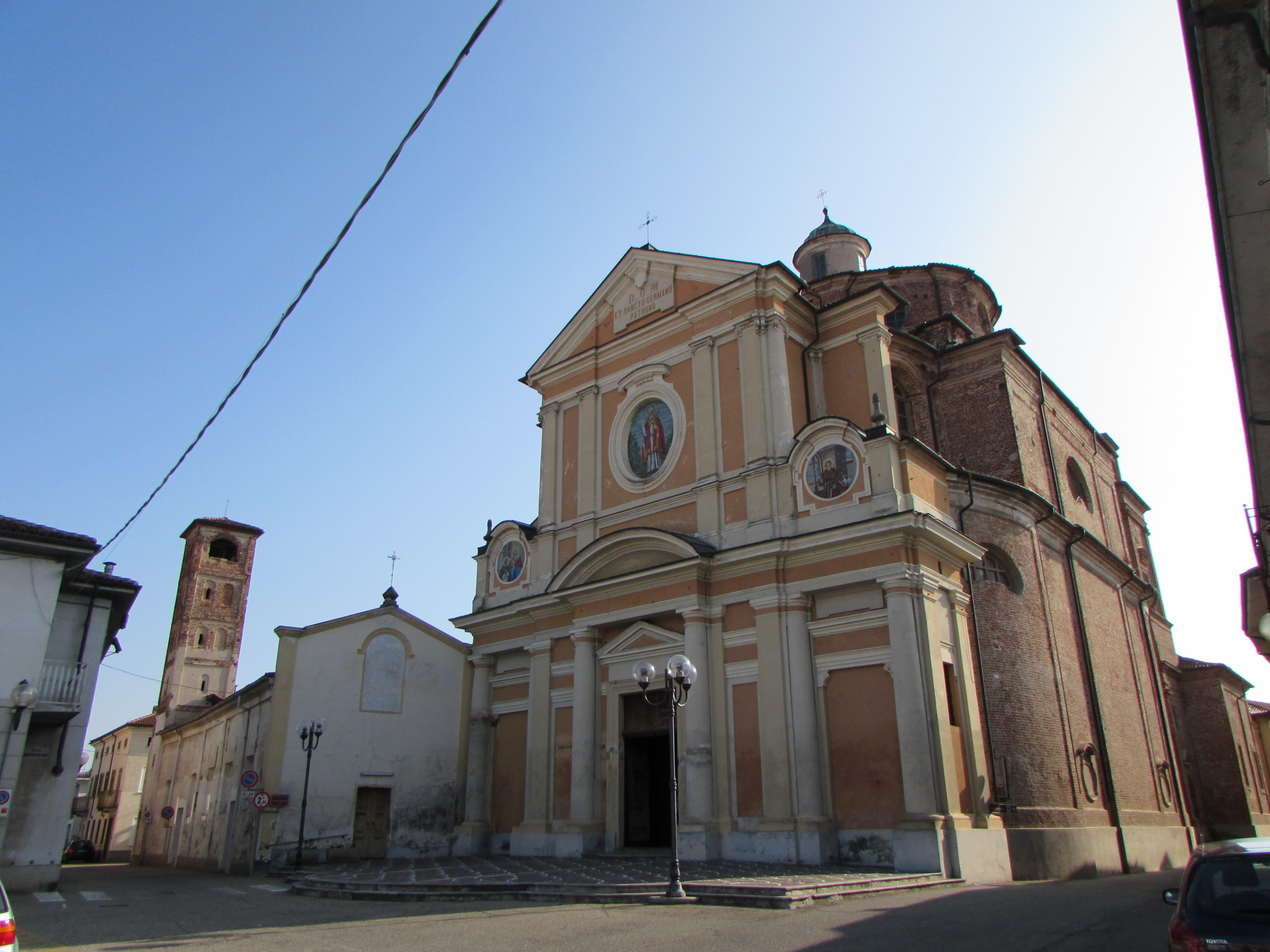 Chiesa dedicata a San Germano d'Auxerre